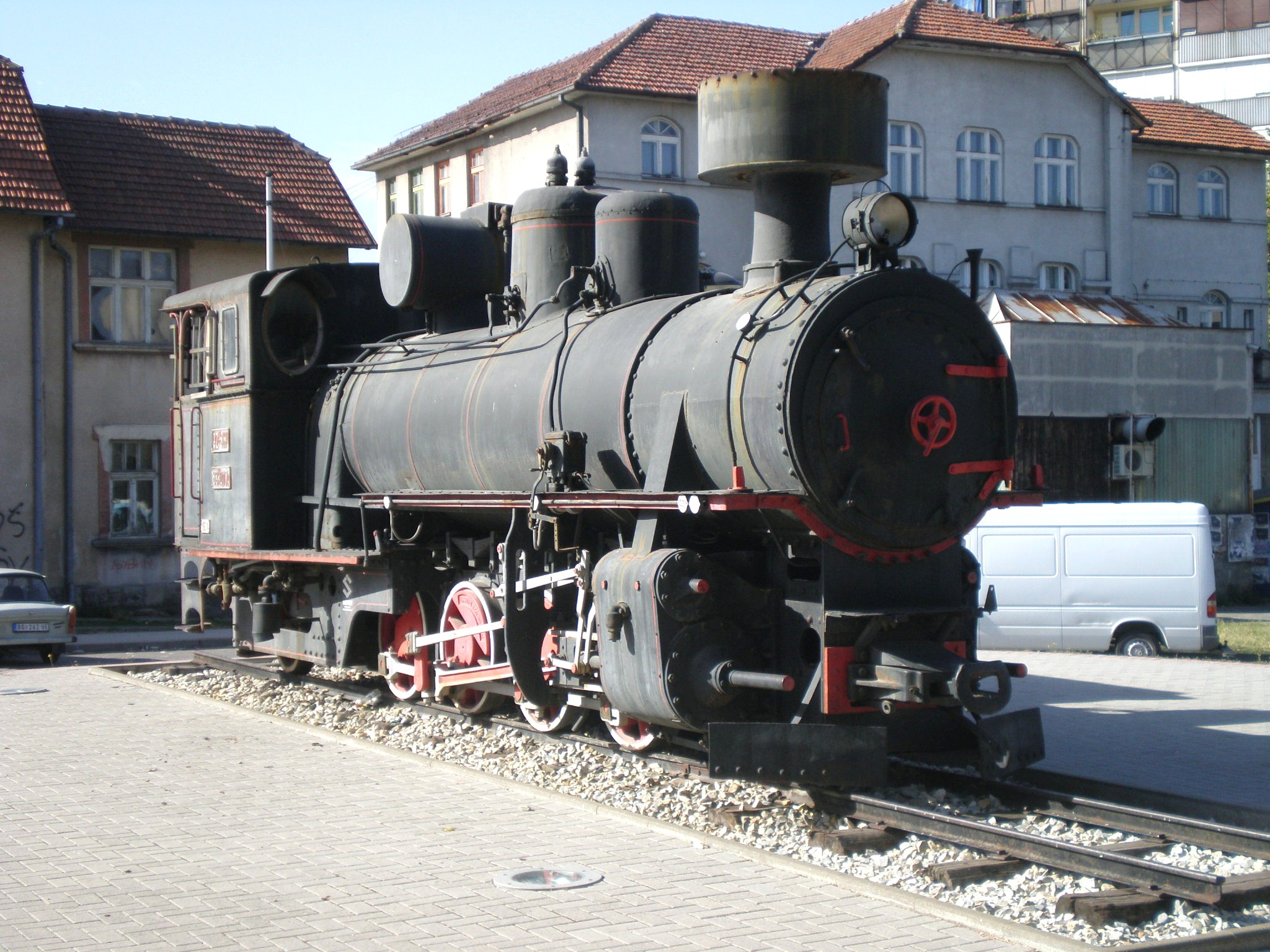 Железничка локомотива из серије 83-017 са тендером налази се испред железничке станице у Чачку.